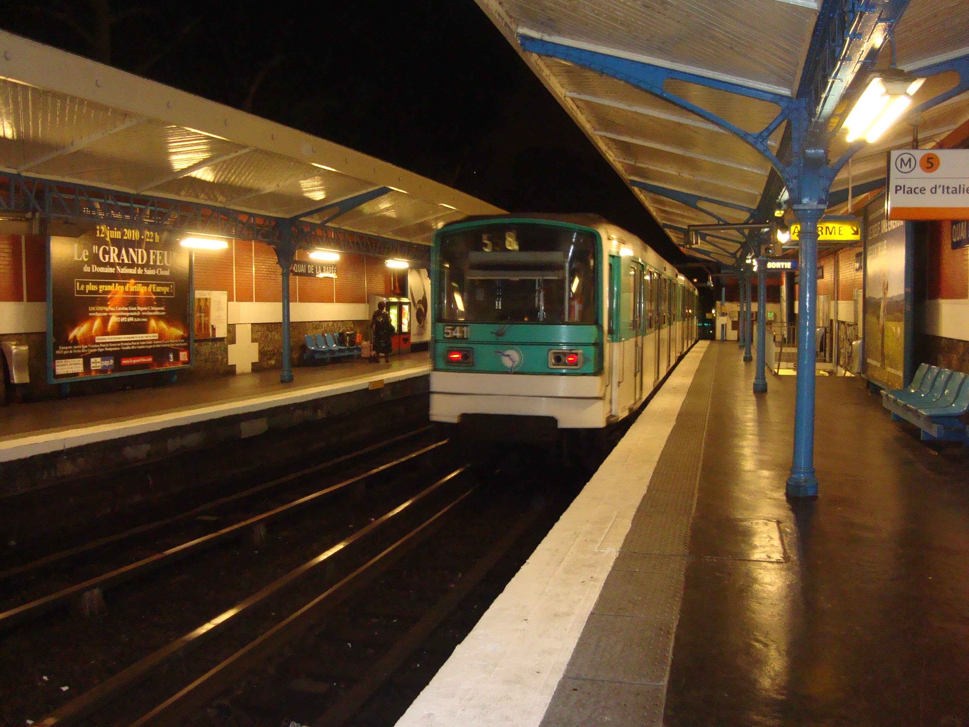 Rame au départ de de la station Quai de la Rapée sur la ligne 5 du métro de Paris de nuit.